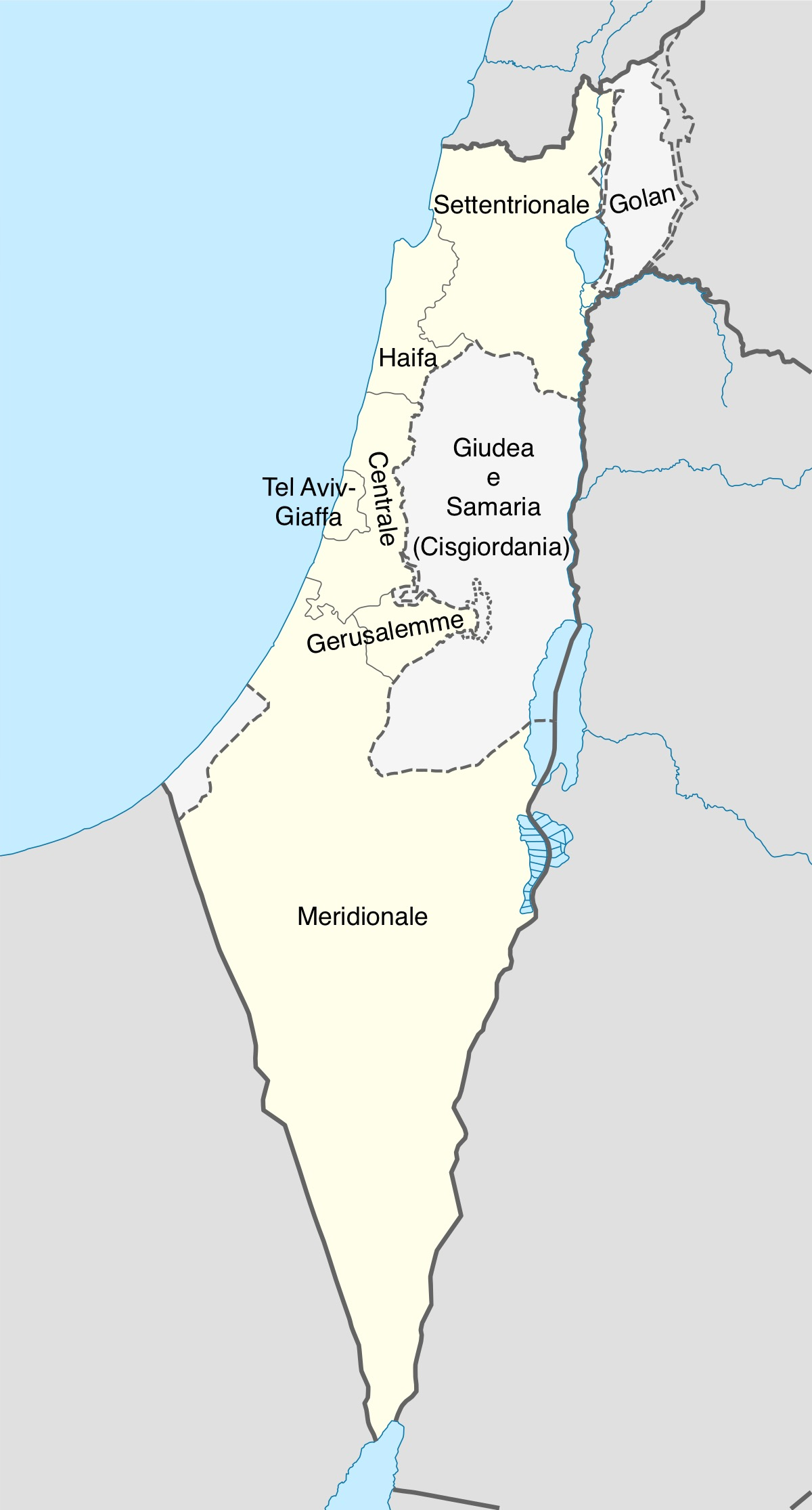 Mappa dei distretti dello Stato d’Israele in italiano. In grigio i territori occupati della Cisgiordania e delle Alture del Golan.